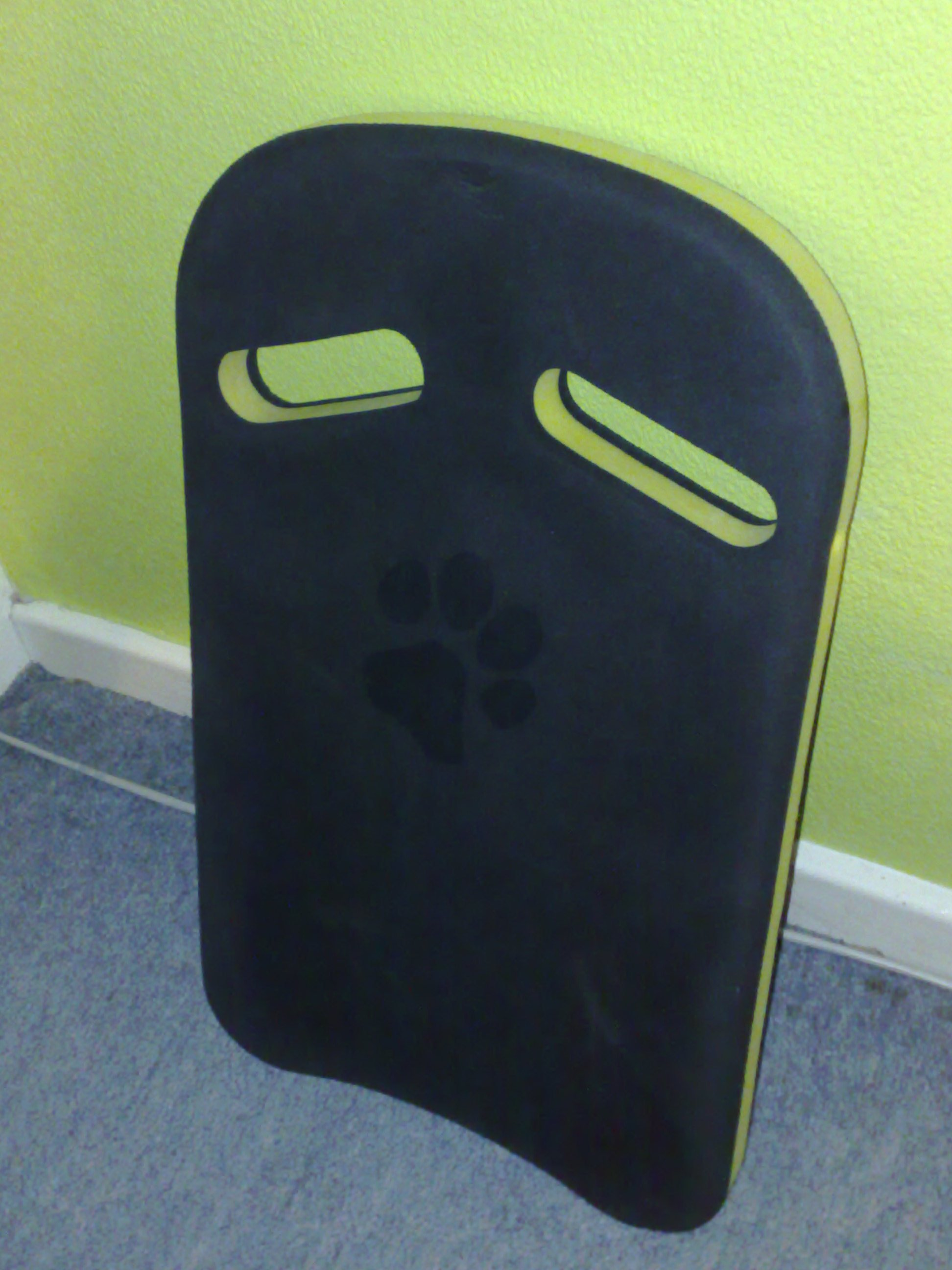 A standard EVA foam kickboard